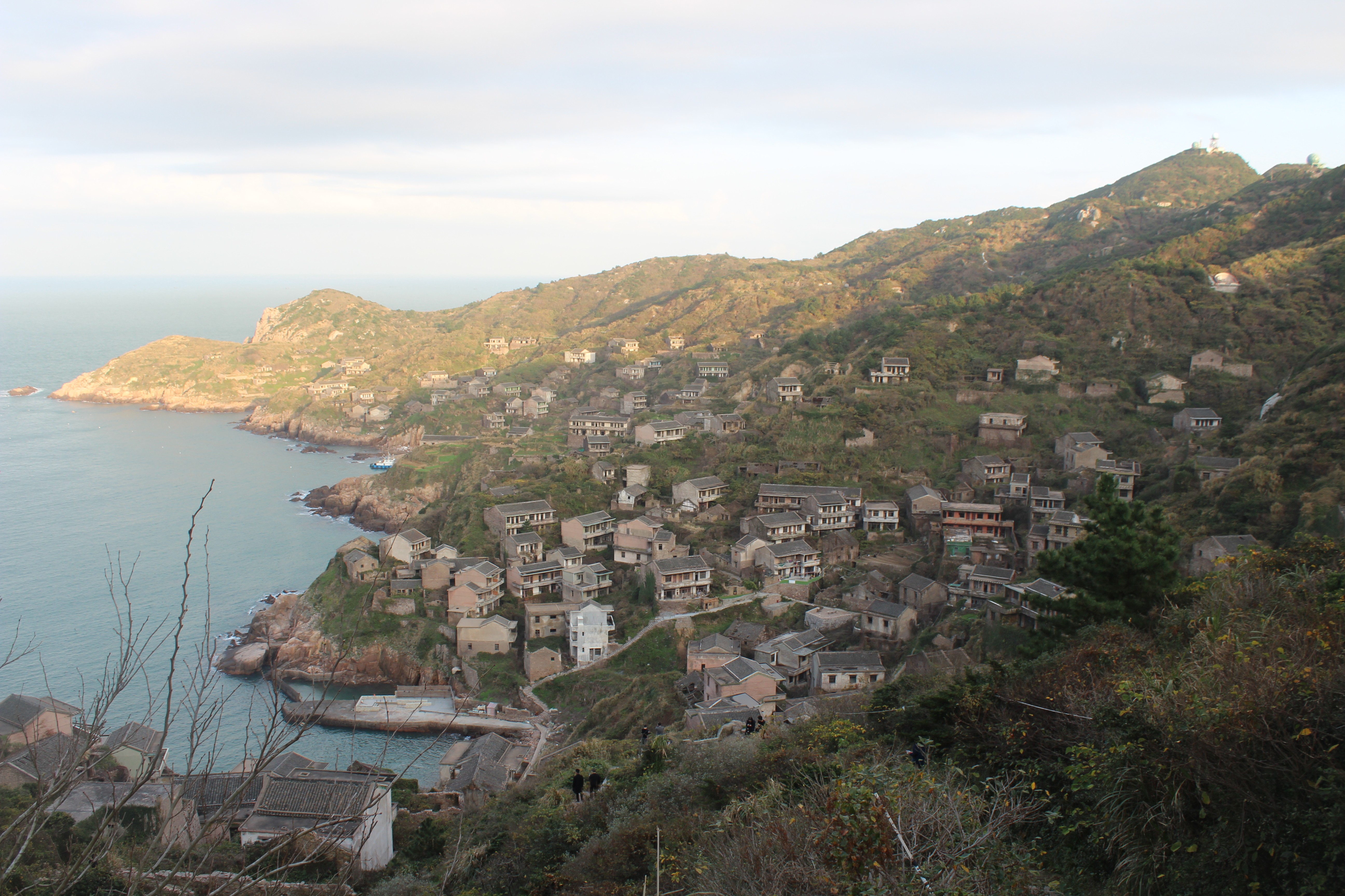 Village abandonnée d'Houtouwan, au nord de l'ile de Shengshan, à 65 km à l'est des côtes de Shanghai. Xian de Shengsi, Ville-Préfecture de Zhoushan, Province du Zhejiang, Chine